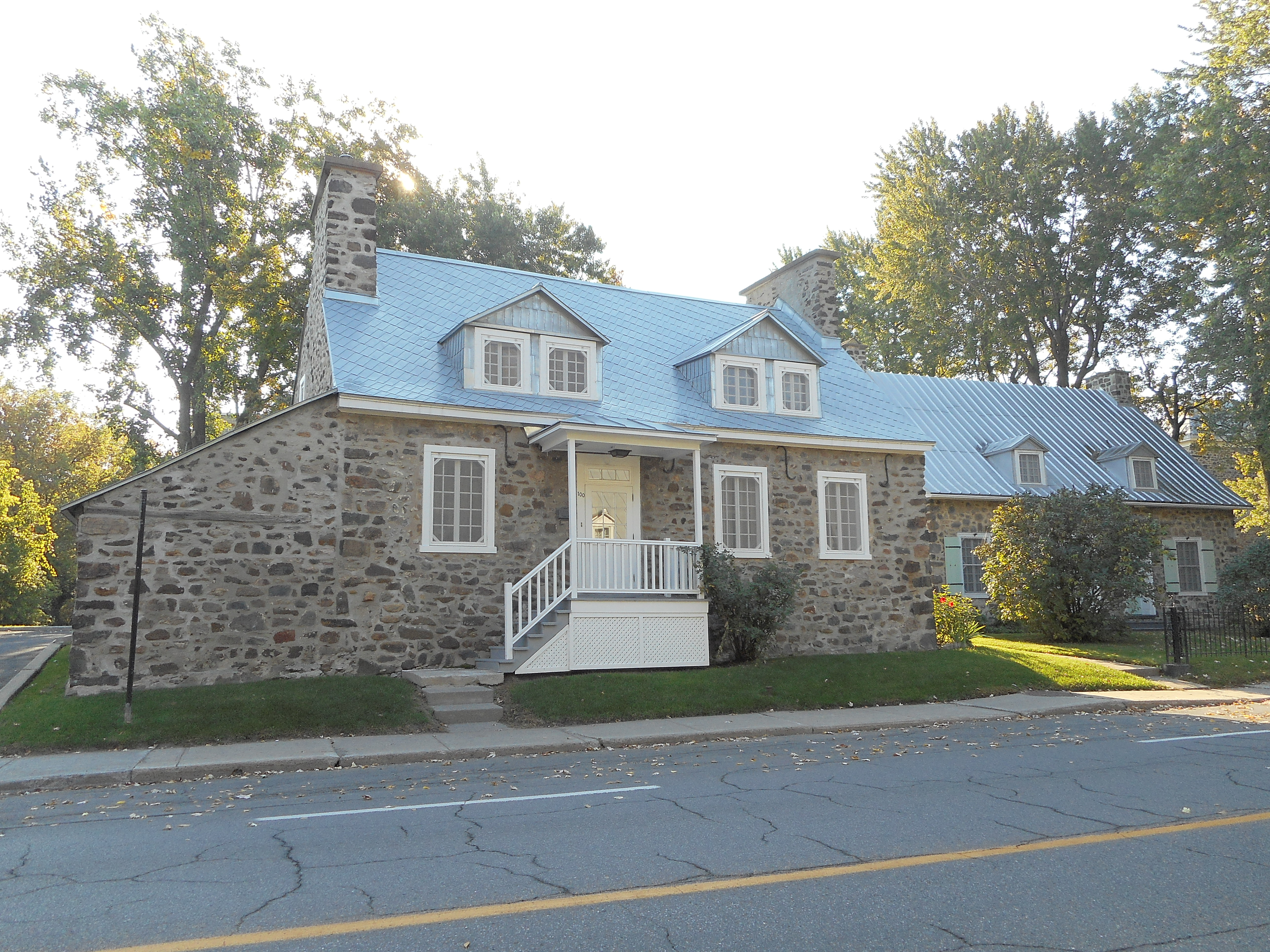 À gauche : Maison Daniel-Poirier, 100, rue Saint-Charles Est, Longueuil, Québec marigot.ca À droite : Maison Marie-Rose-Durocher (autres appellations : Maison de la Fabrique, Maison de la fondation de la Congrégation des Soeurs des Saints-Noms-de-Jésus-et-de-Marie, Maison Labadie), 90, rue Saint-Charles Est, Longueuil, Québec